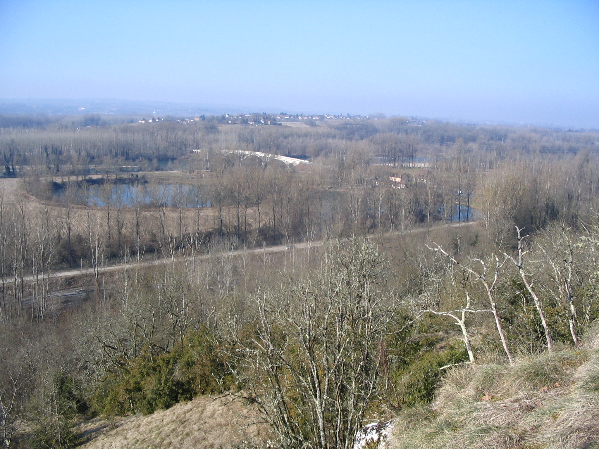 Pelouse sèche de Cordon - Brégnier-Cordon - Vue sur les sablières et le Rhône